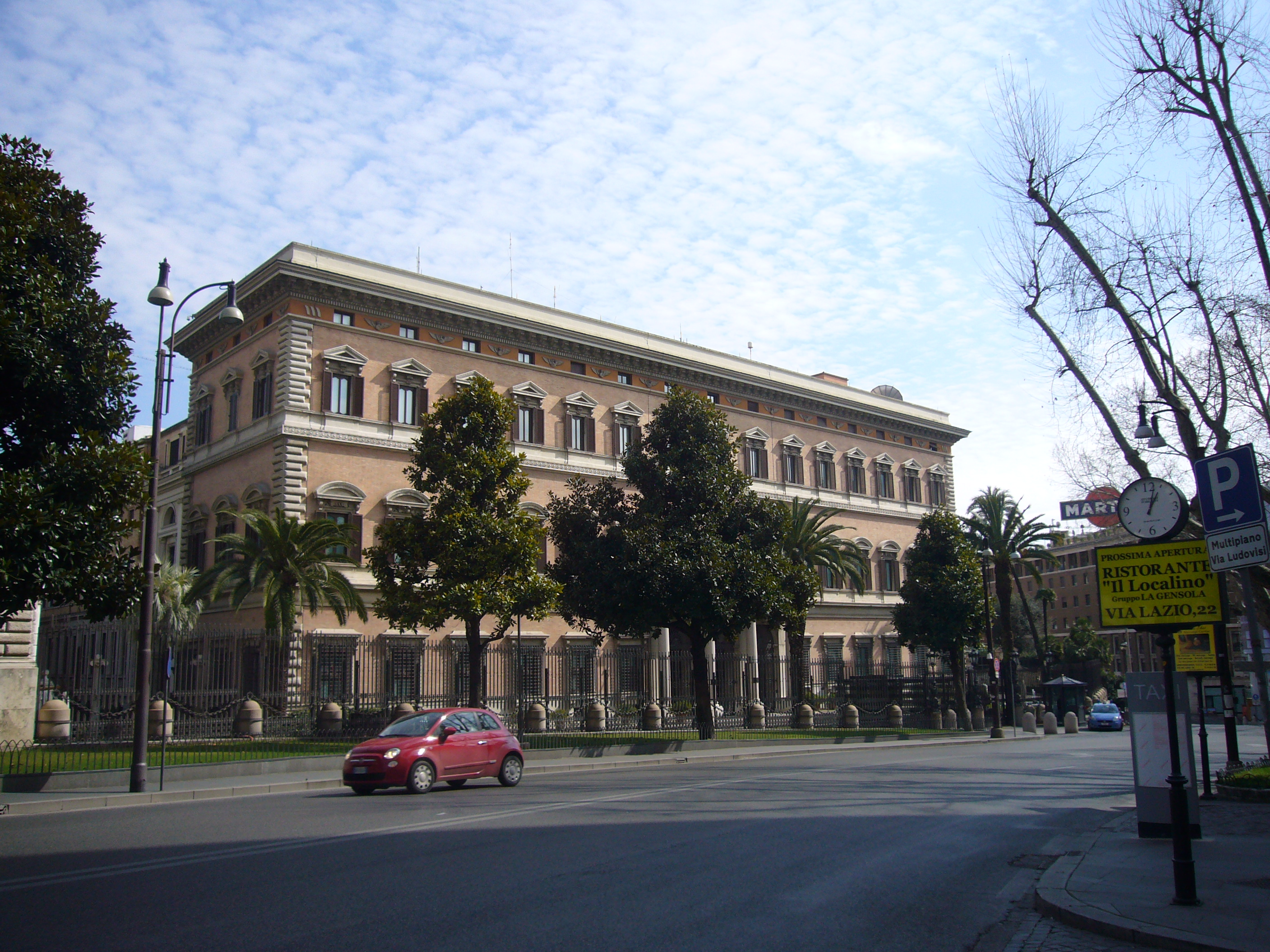 Roma, via Veneto: palazzo Margherita, già Piombino, U.S. Embassy (Koch, 1890)